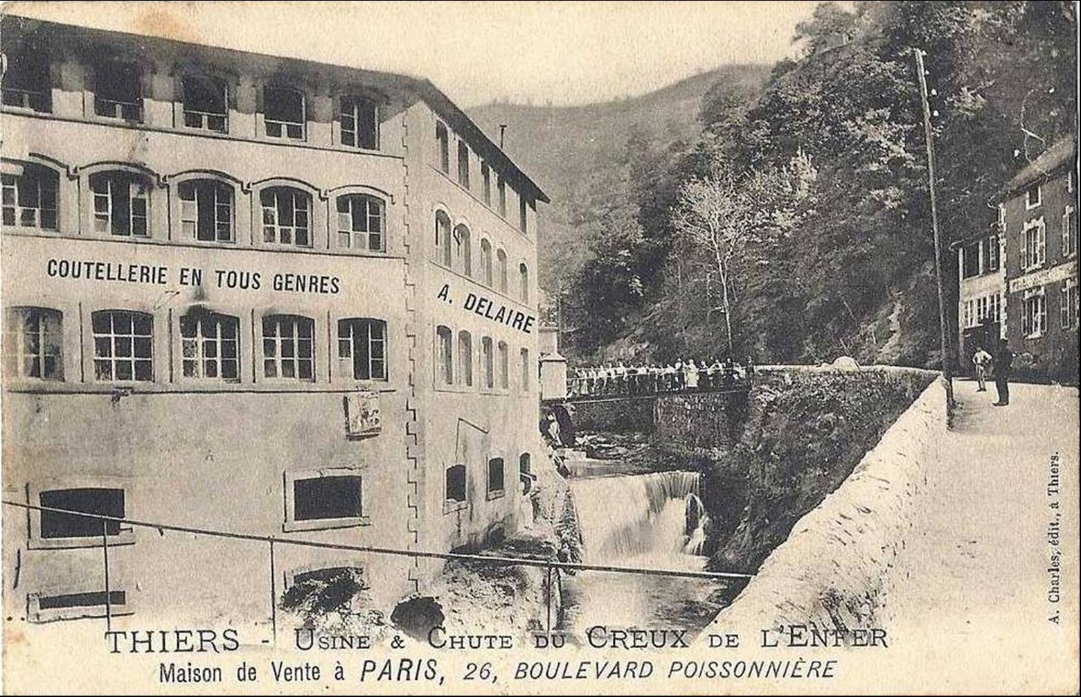 Usine du Creux-de-l'enfer